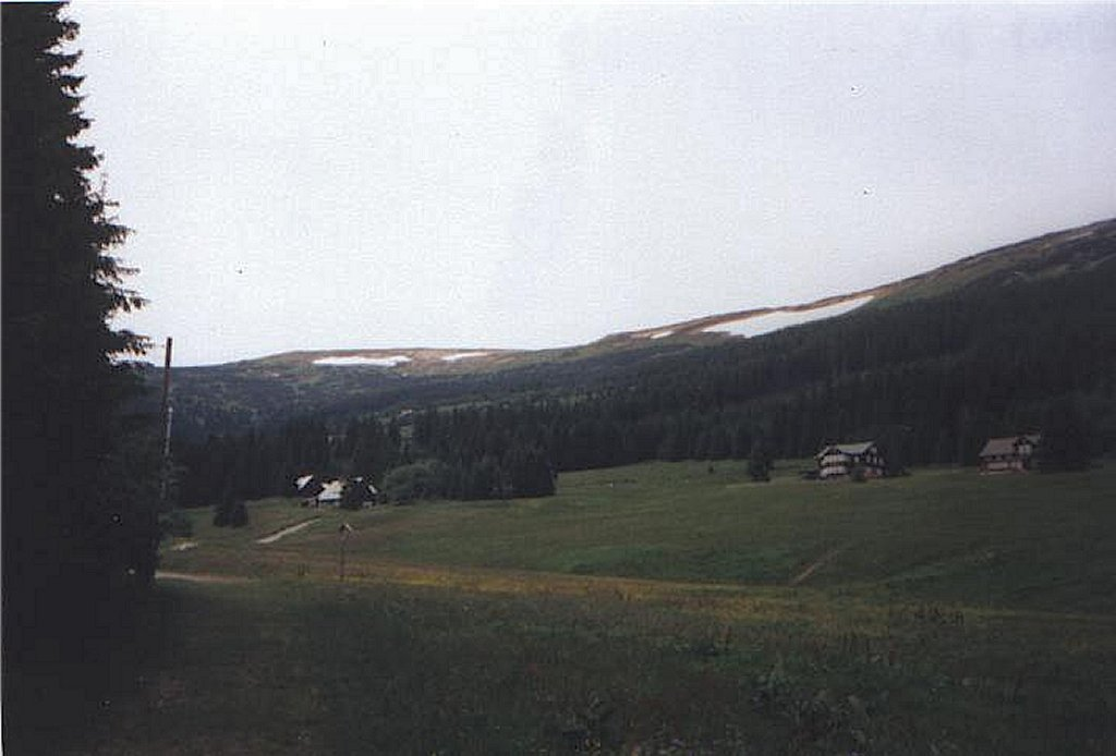 Modrý důl